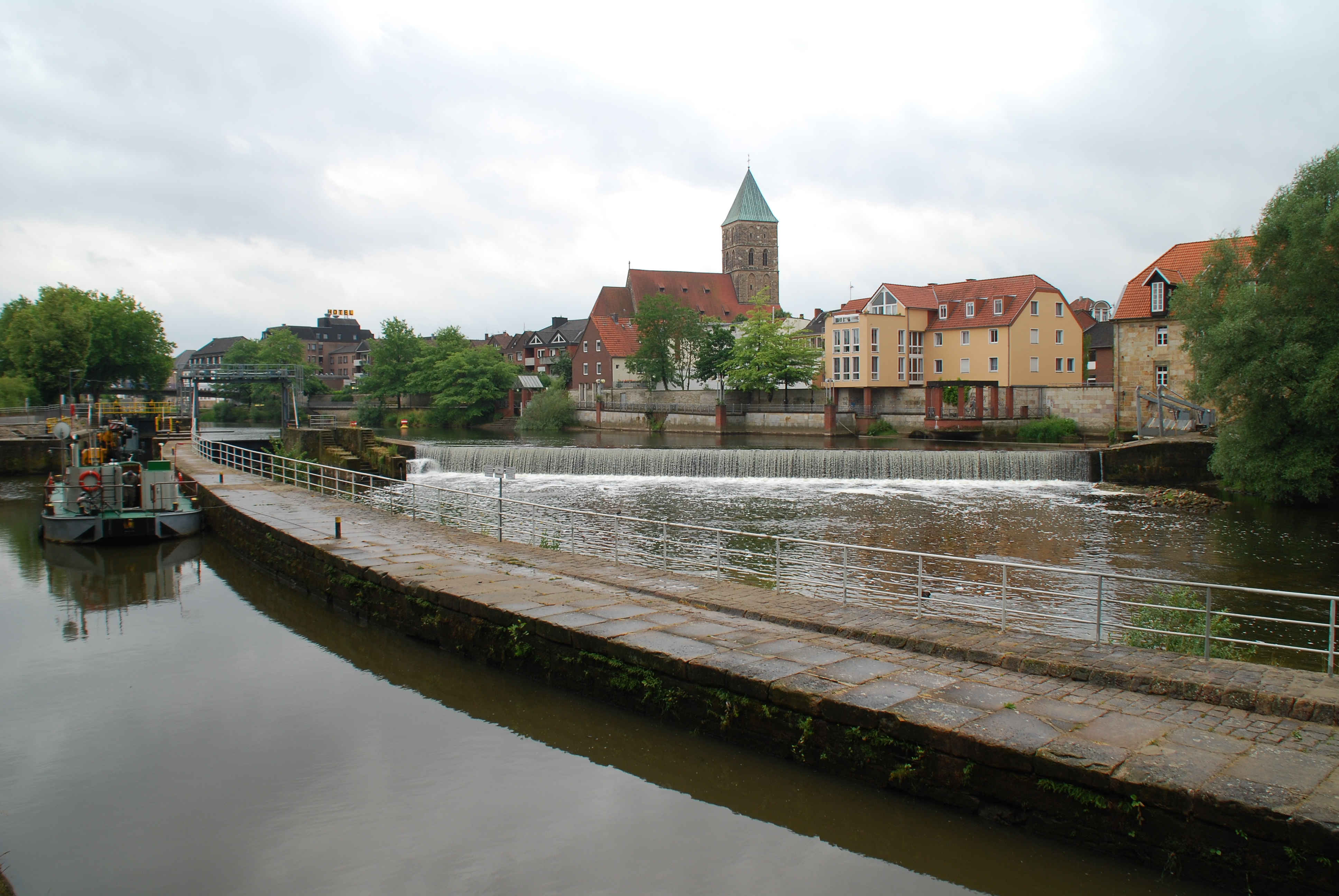 Emswehr in Rheine, Stadtkirche im Hintergrund This image shows a heritage building in Germany, located in the North Rhine-Westphalian city Rheine (no. 102).